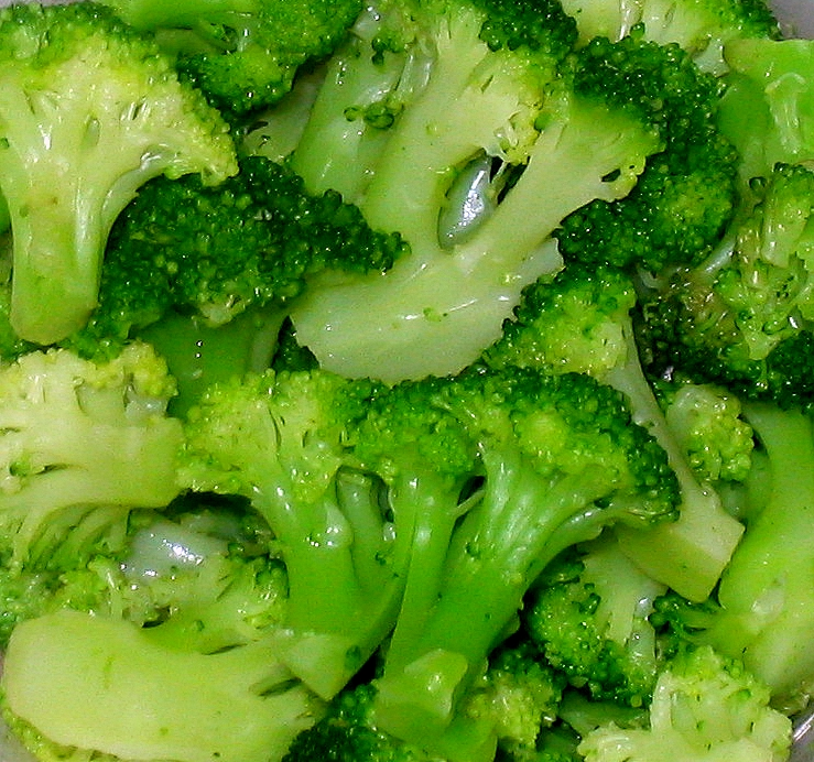 broccoli in a dish